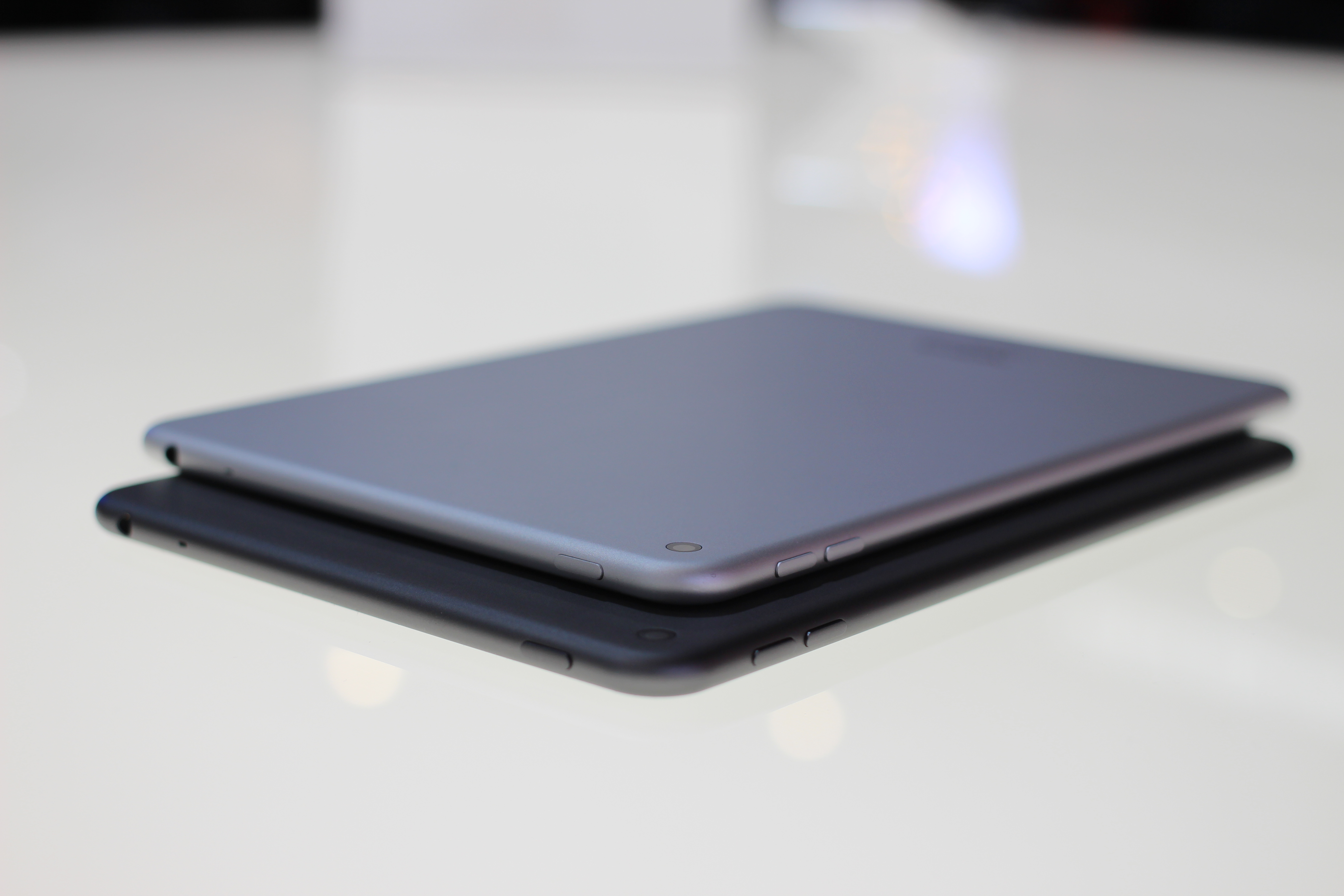 Nokia N1 tablet